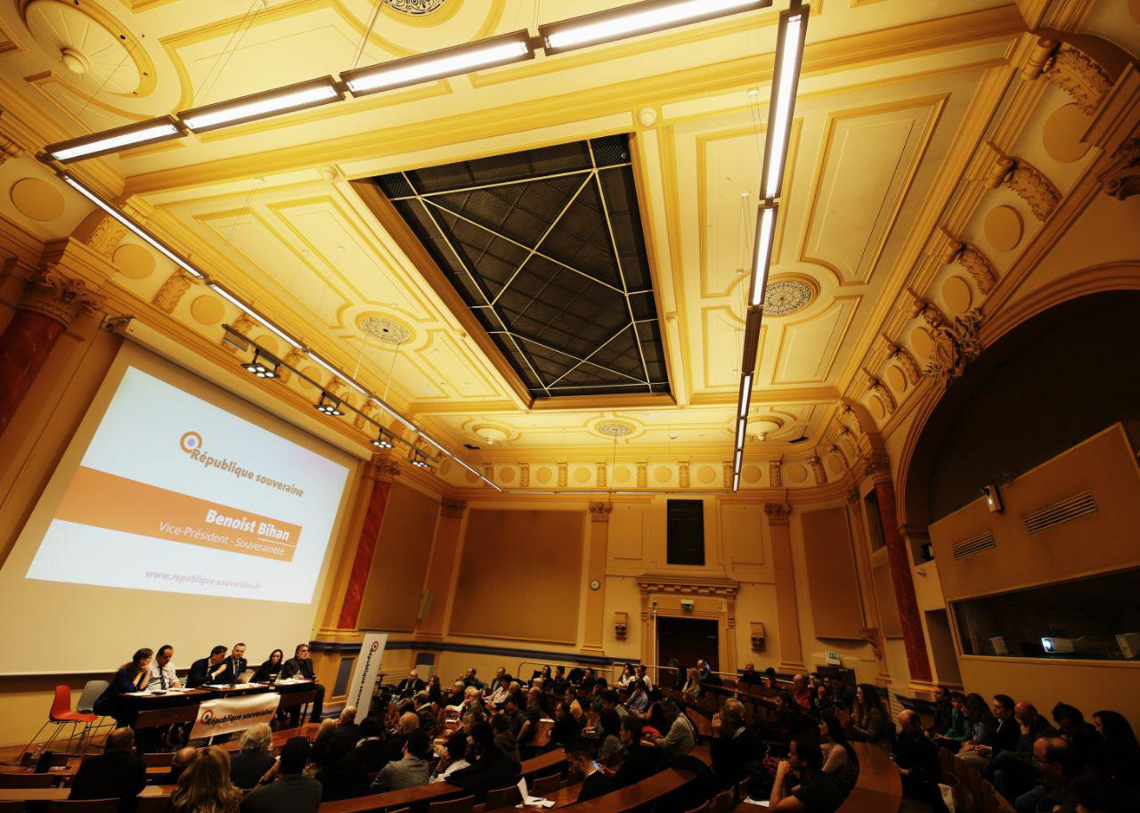 Soirée de lancement public de République souveraine le 23 mars 2019 à la Société de Géographie, Paris